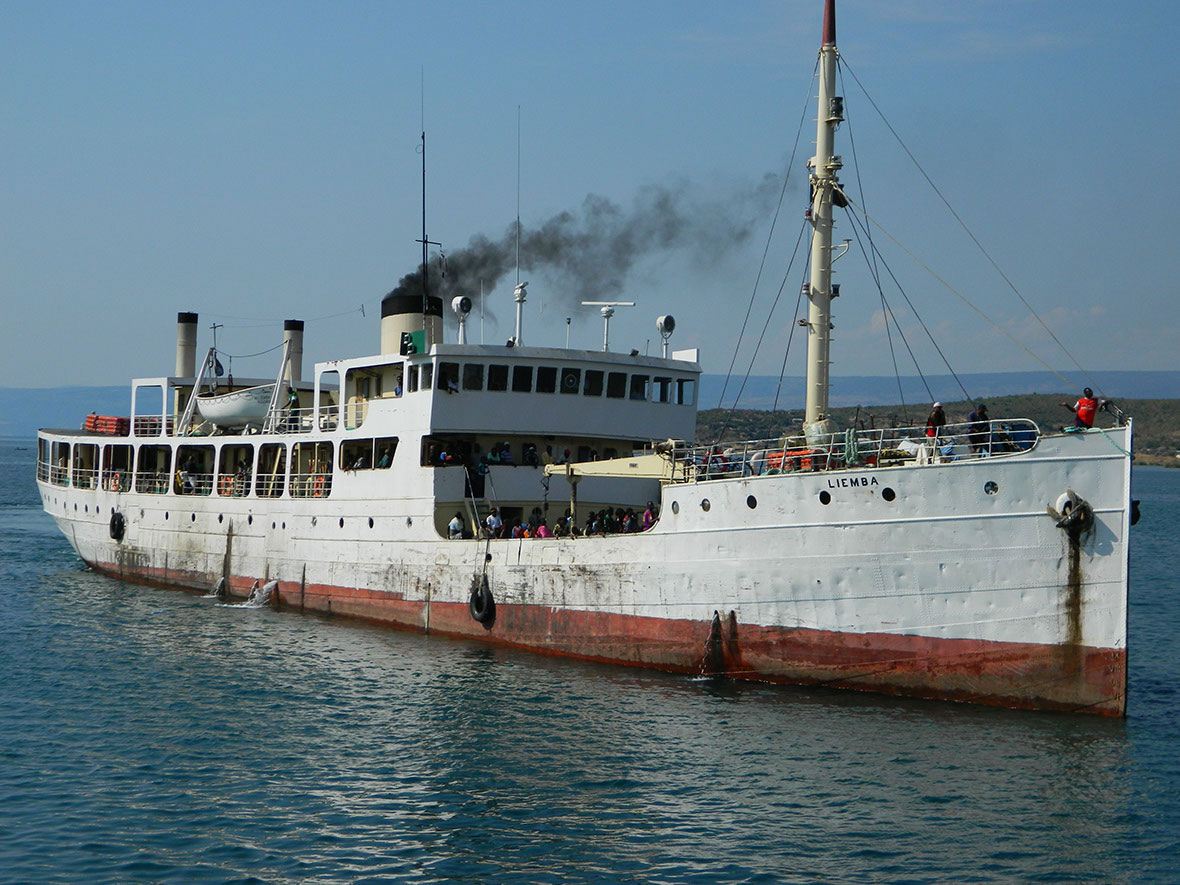 Liemba halen kullanımdadır.